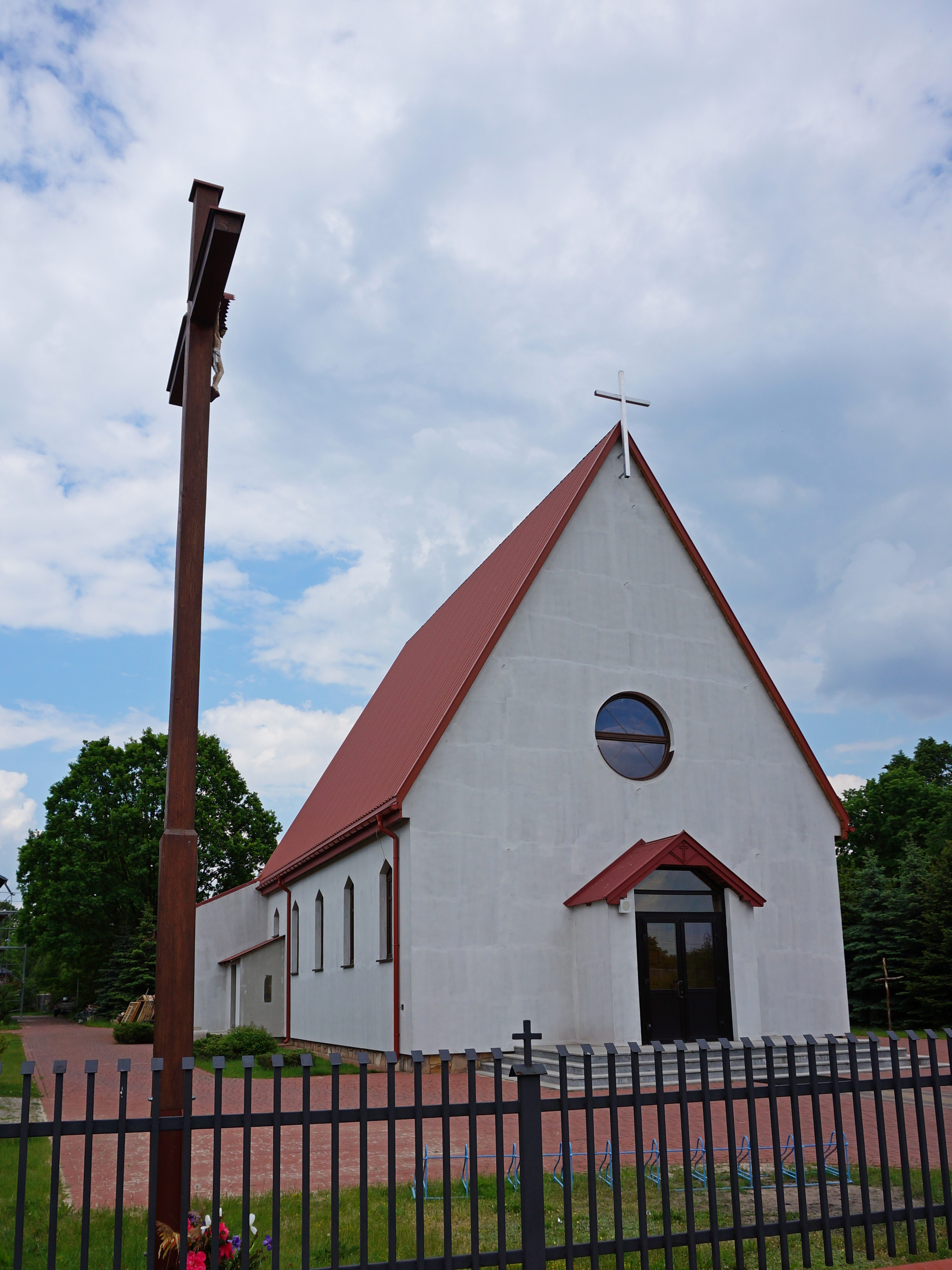 Kończyce-Kolonia - Kościół Niepokalanego Poczęcia NMP.